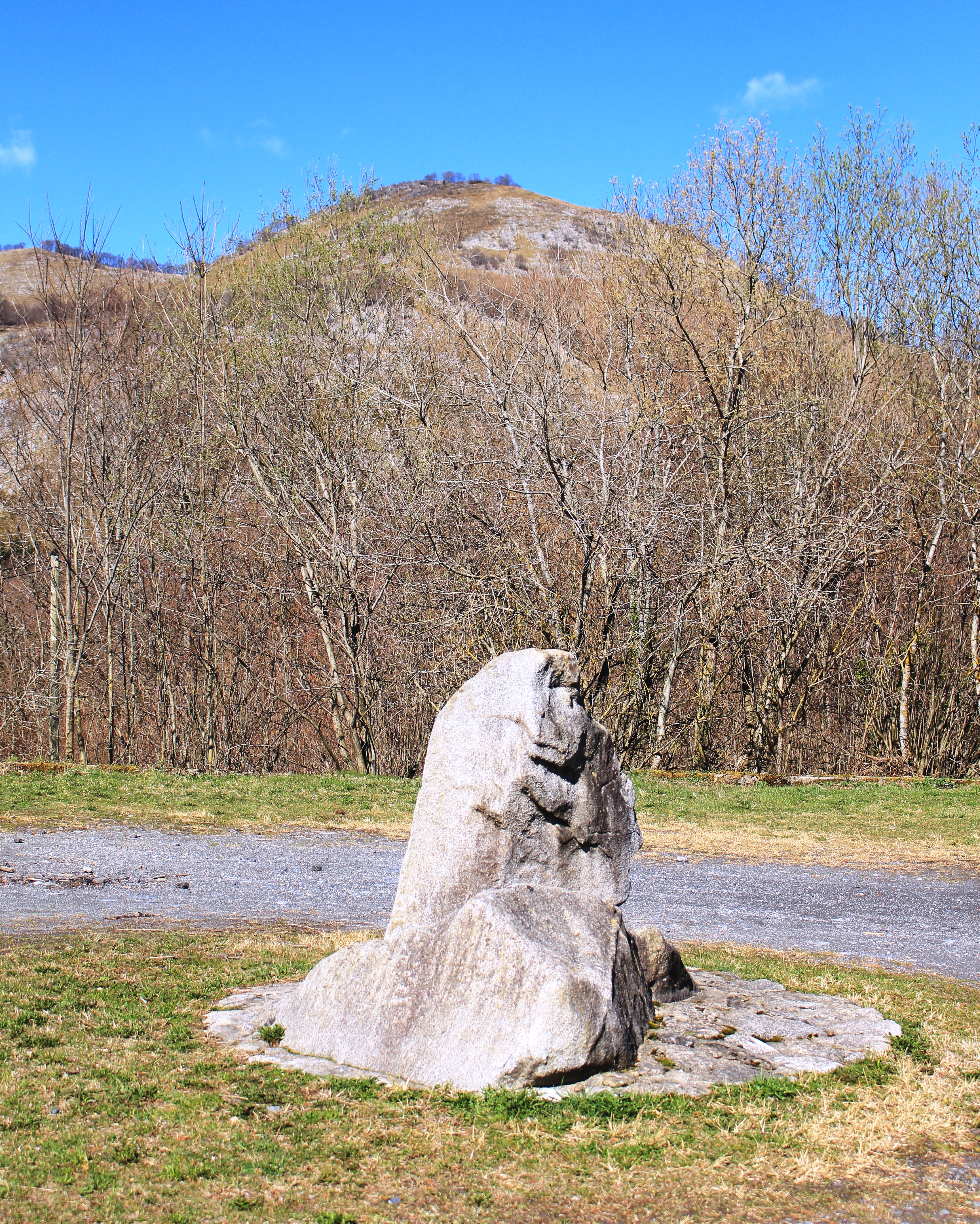 Menhir de Ségus (Hautes-Pyrénées)